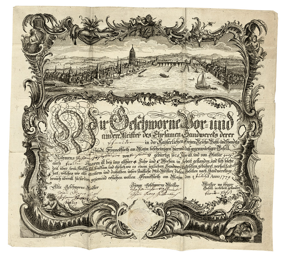 Gesellenbrief der Frankfurter Schneider-Zunft für Johann Christoph Fribor. Kupferstich mit handschr. Eintragungen und papiergedecktem Zunftsiegel. 37 x 41 cm. Frankfurt a. M. 2.VII.1779.